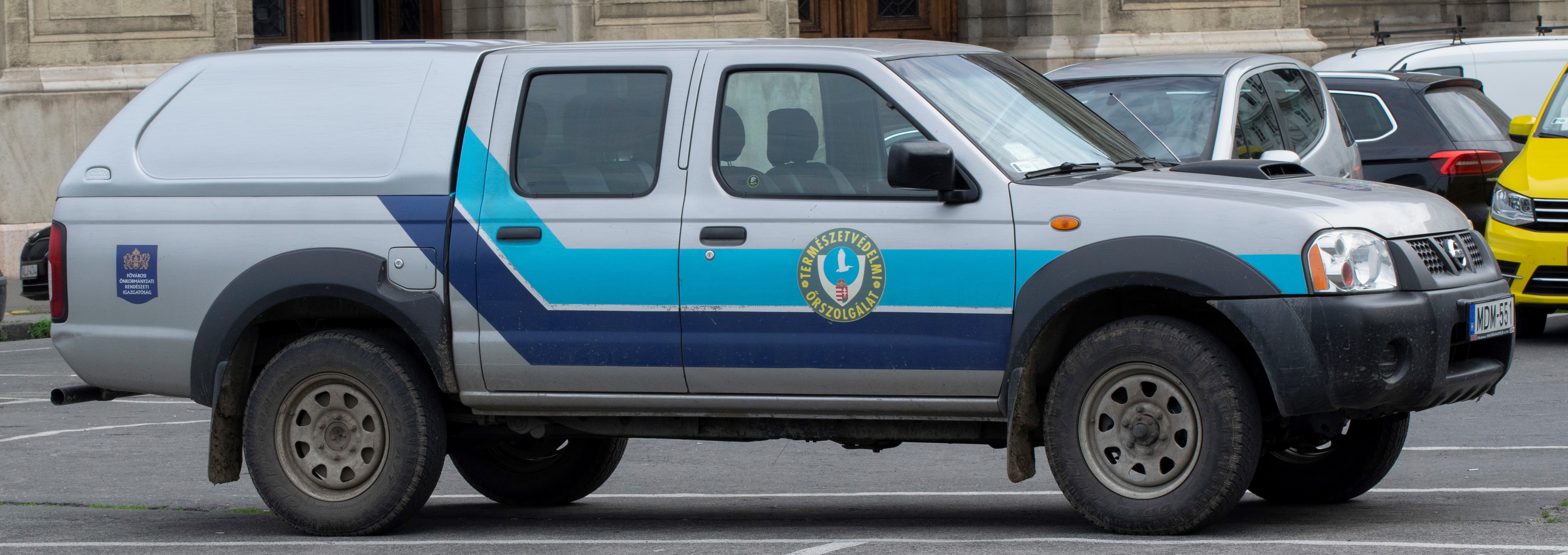 FÖRI Természetvédelmi Őrszolgálat